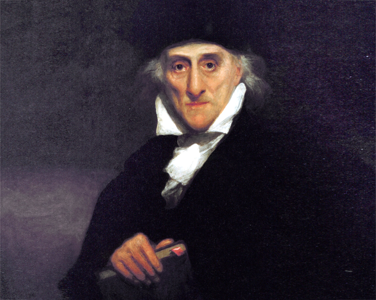 Samuel Morse (1791–1872) zugeschrieben: Lorenzo Da Ponte (1749–1838), ca. 1830. New York Yacht Club. Detail.